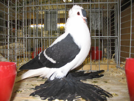 Sächsische Flügeltaube